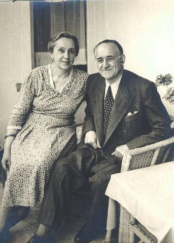 Məhəmməd Əmin Rəsulzadə və Leyla Rəsulzadə